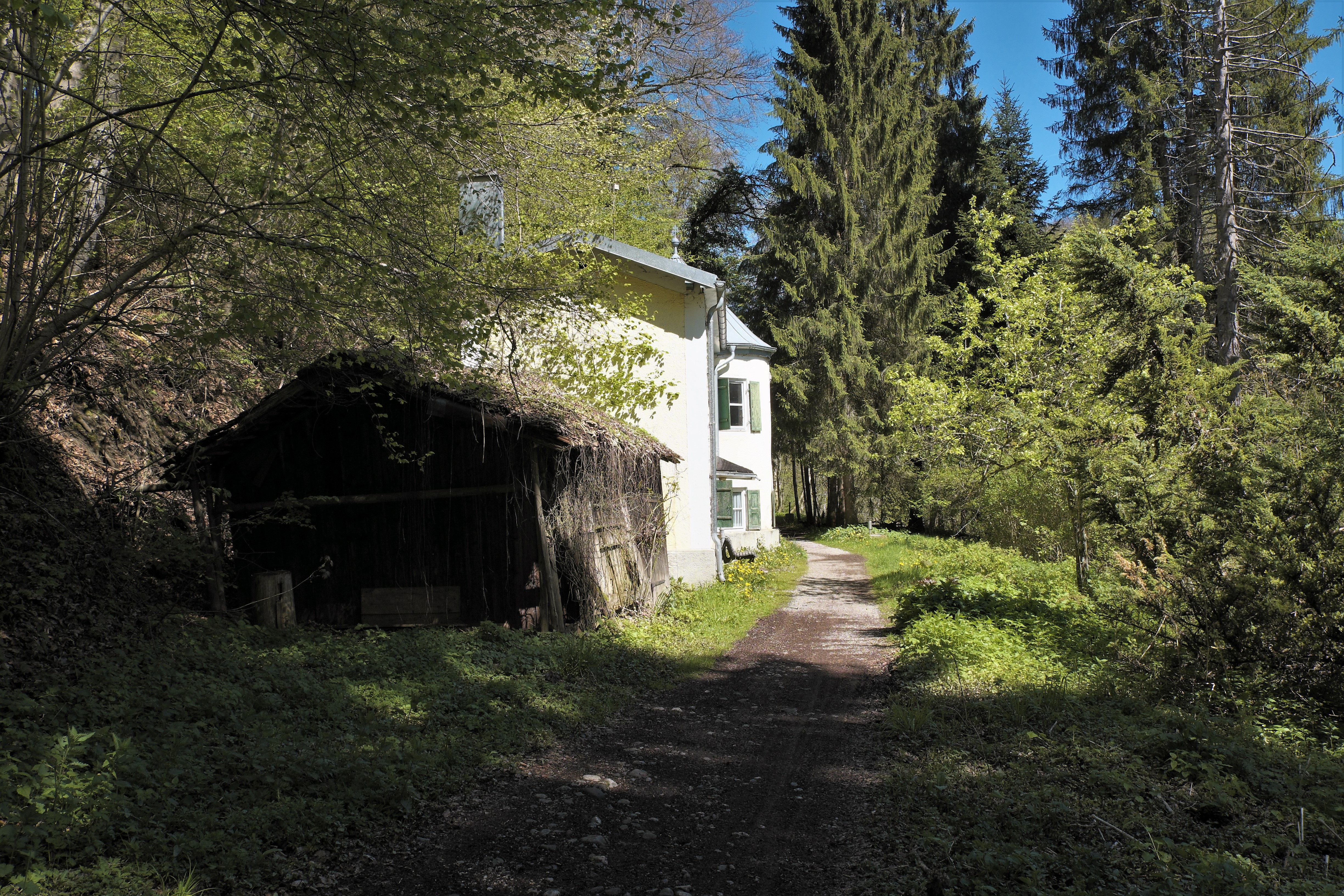 Haus zum Kapeller in Mühlthal in Starnberg im Landkreis Starnberg (Bayern, Deutschland)